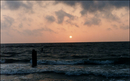 author:drs Baltyk w okolicach Niechorza